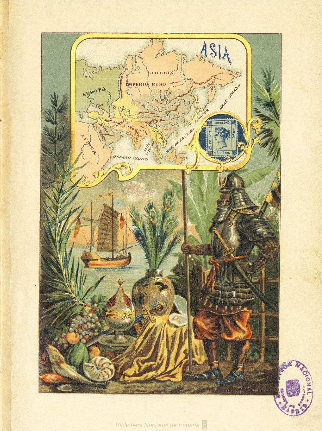 Viajes a Oriente [Alfredo Opisso] Autor: Opisso, Alfredo (1847-1924) Fecha: entre 1898 y 1899 Datos de edición: Barcelona, Librería de Antonio J. Bastinos, Editor